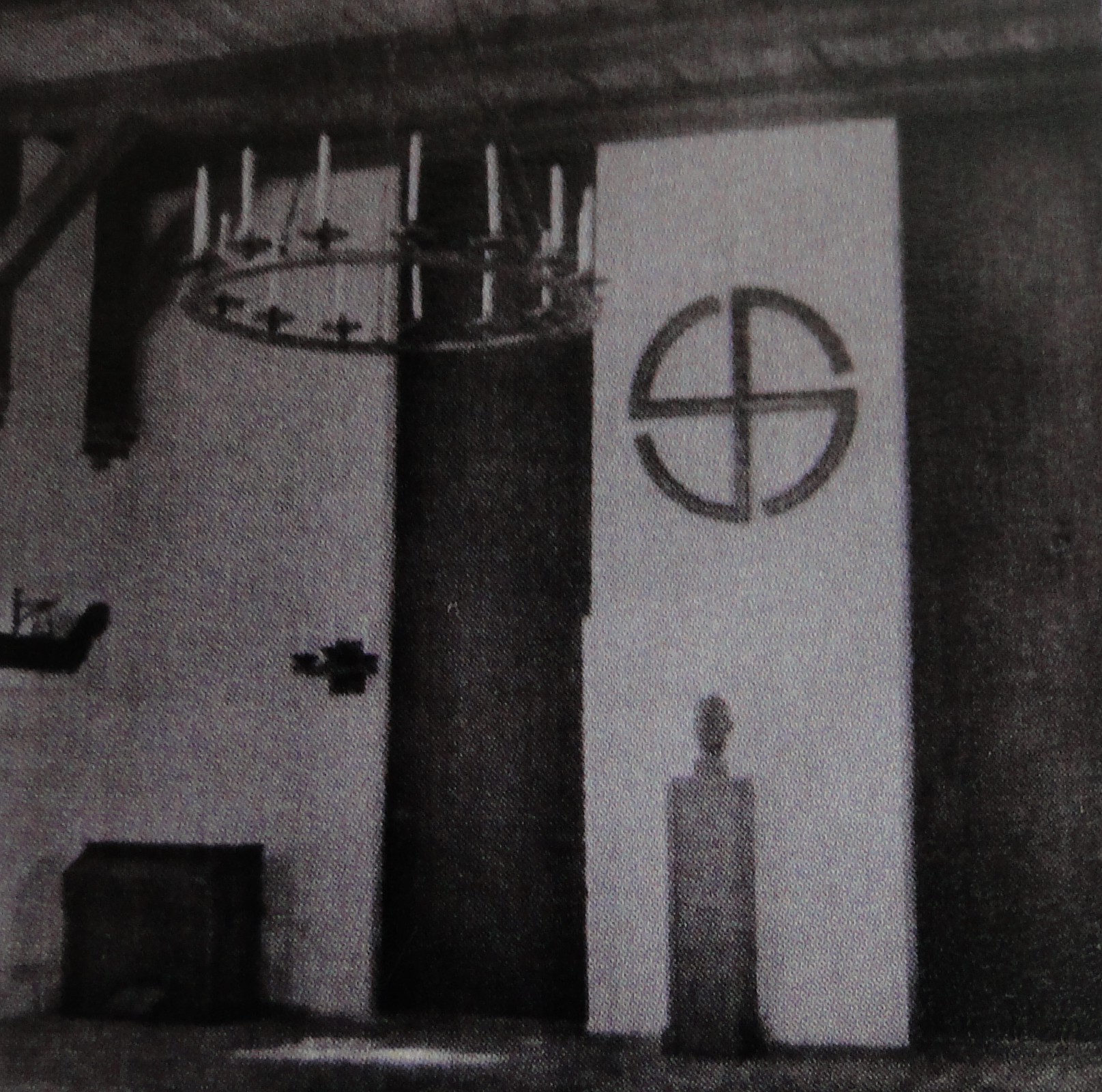 Gertrudenkapelle zur Nazizeit in den 1930er Jahren nach dem Umbau zur Ahnenhalle.